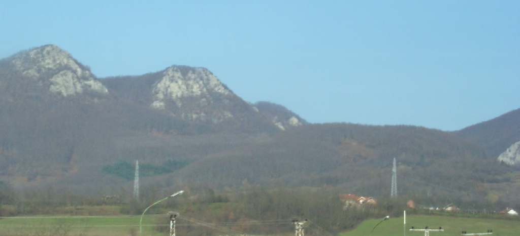 Kozara, Kozaracki kamen (659m)